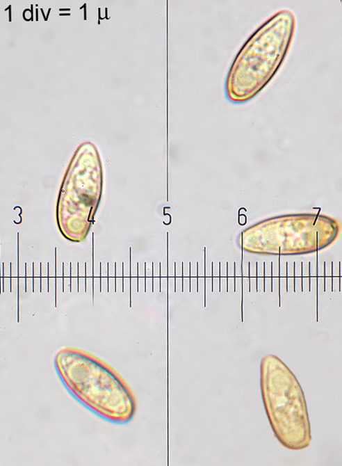 Boletus luridus Schaeff.